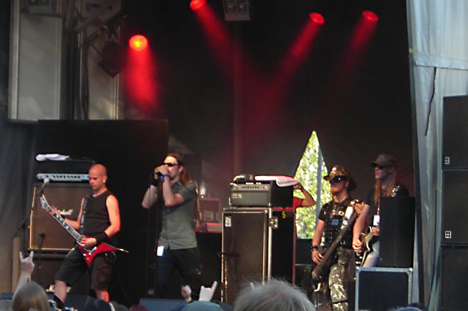 Charon band - Pirkanmaan maakunta, Western Finland - 9 Dec. 2007